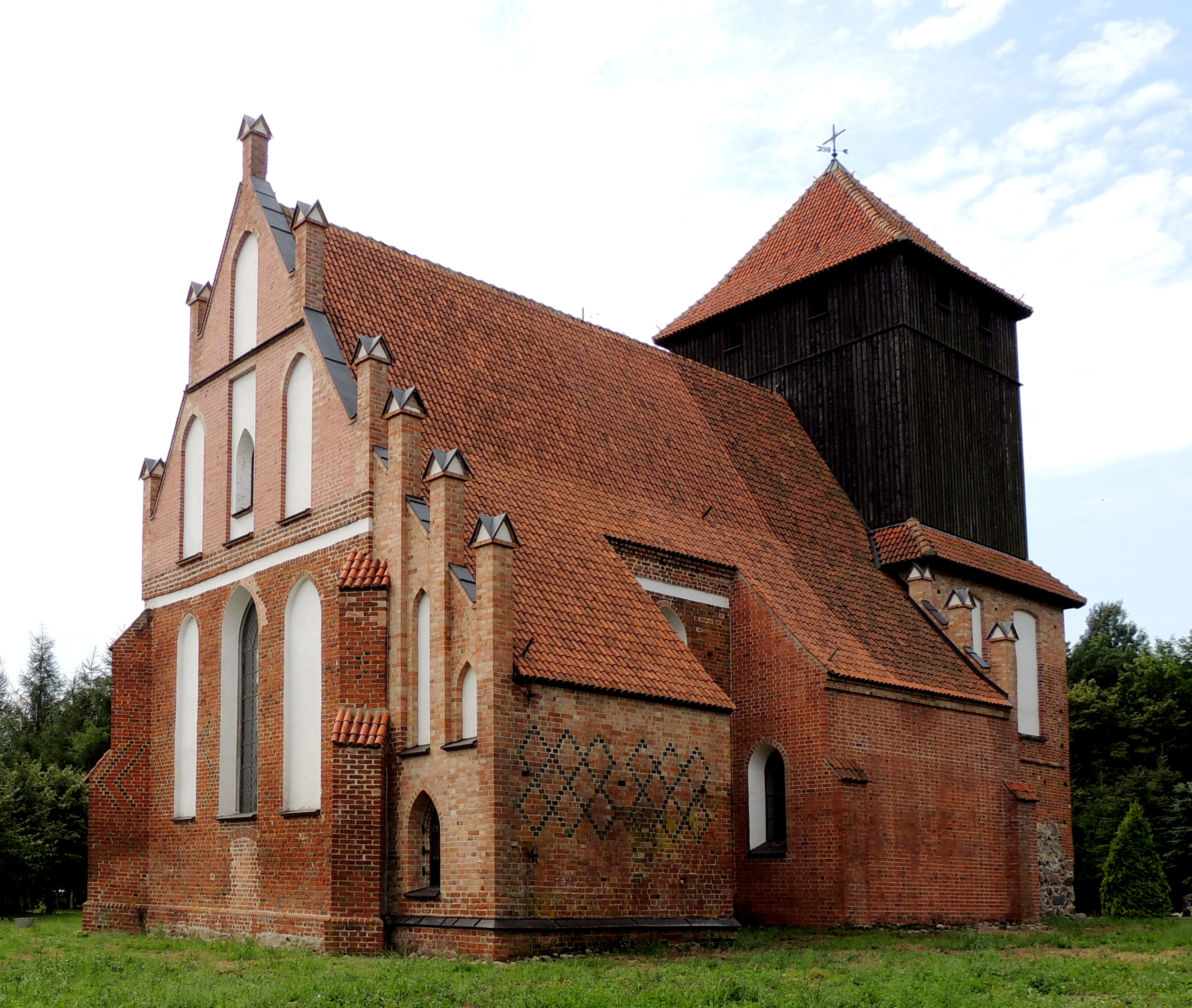 Pierzchały - kościół parafialny pw. Narodzenia NMP i św. Małgorzaty (1330-1341) wraz z cmentarzem przykościelnym